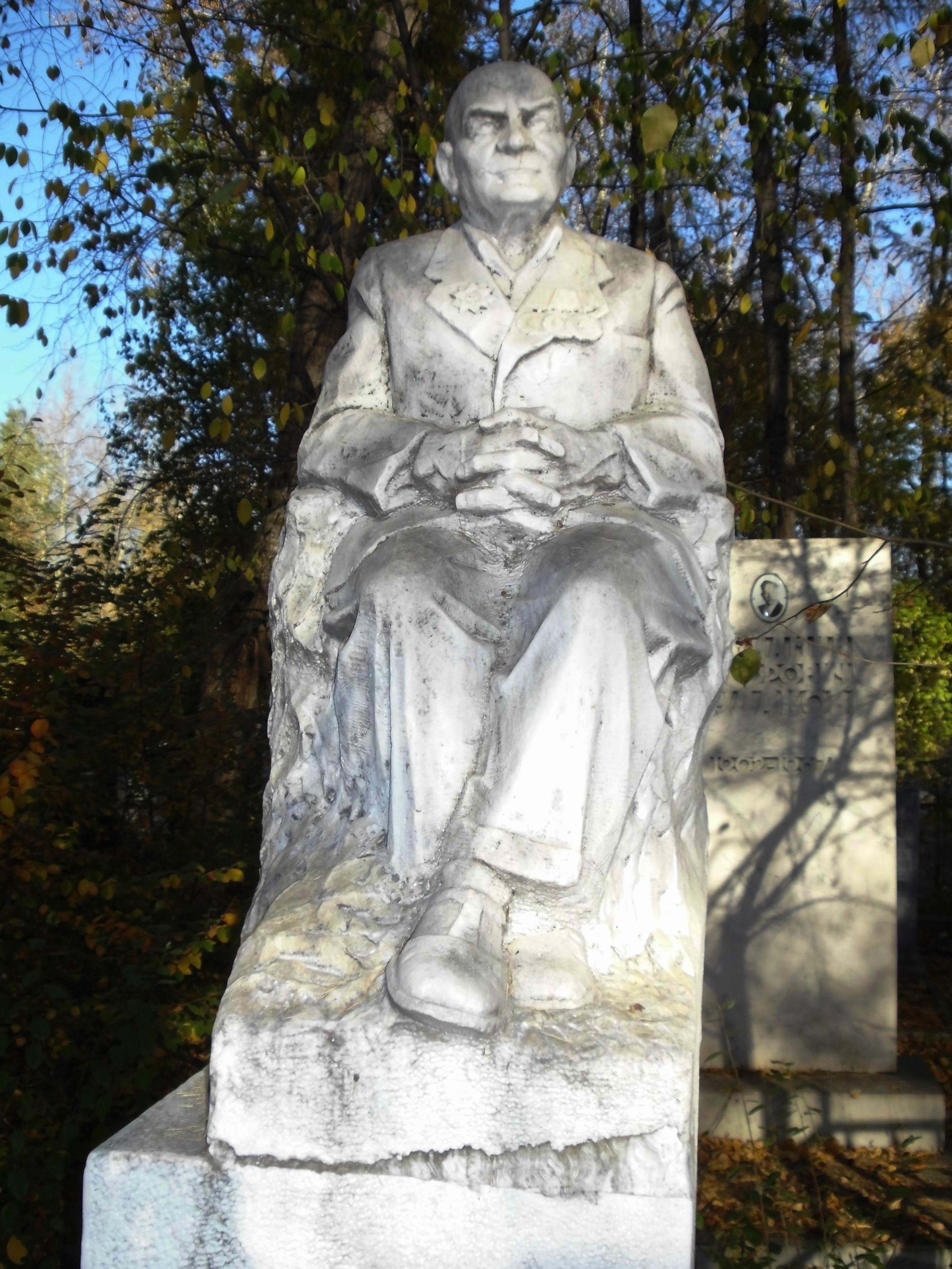 Могила Белостоцкого Ивана Степановича, революционера, кавалера 3-х орденов Ленина, заведующего областным отделом здравоохранения, почётного гражданина города Челябинска. Дом в котором он жил и здание где работал - охраняемые объекты культурного наследия. Город Челябинск, Успенское кладбище. Памятник на могиле верхняя часть со скульптурой).